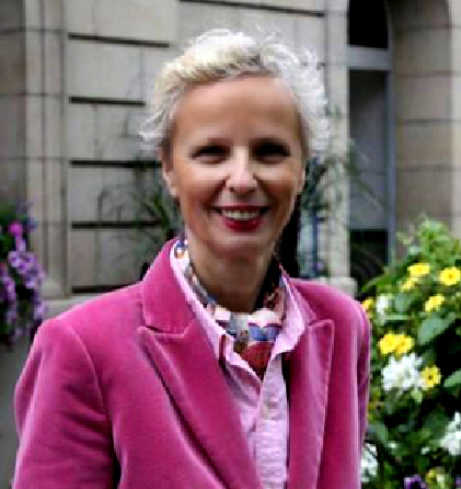 Spécialiste reconnue sur le plan international de Simone de Beauvoir.